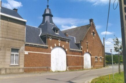 De hoeve "D' Eyck" staat reeds afgebeeld op de aanlegschets van de Tiensesteenweg (1710). De schuur van deze typisch Brabantse hoeve bestaat nog met muurgedeelten uit 1661. Het geheel is opgetrokken in gesloten bouworde. In het midden van de 18de eeuw behoorde het pachthof toe aan de erfgenamen Aerts. Marinus Aerts was in de periode rond 1729 meier van Korbeek-Lo. In het begin van de 20ste eeuw stond de hoeve, omwille van haar ruime stallingen en haar zeer grote schuur, model voor andere boerderijen. De langslopende Veulestraat werd omgedoopt tot Eikstraat. De hoeve, voorzien van een mooi duivenhok met torenspits, is momenteel bezit van de familie Trappeniers. Actuele verkavelingsplannen bedreigen deze prachtige hoeve en bijhorende gronden. Aan de overzijde van de Oudebaan, op de hoek met de Witteweg, staat een stemmig kapelletje, door de familie Trappeniers gebouwd na de restauratie van hun pachthof.